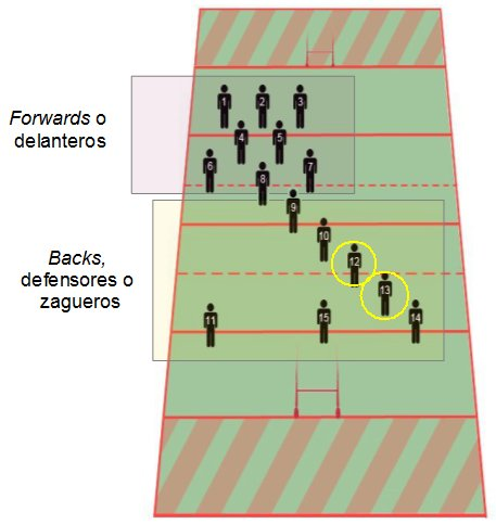 Rugby posiciones. Centros.